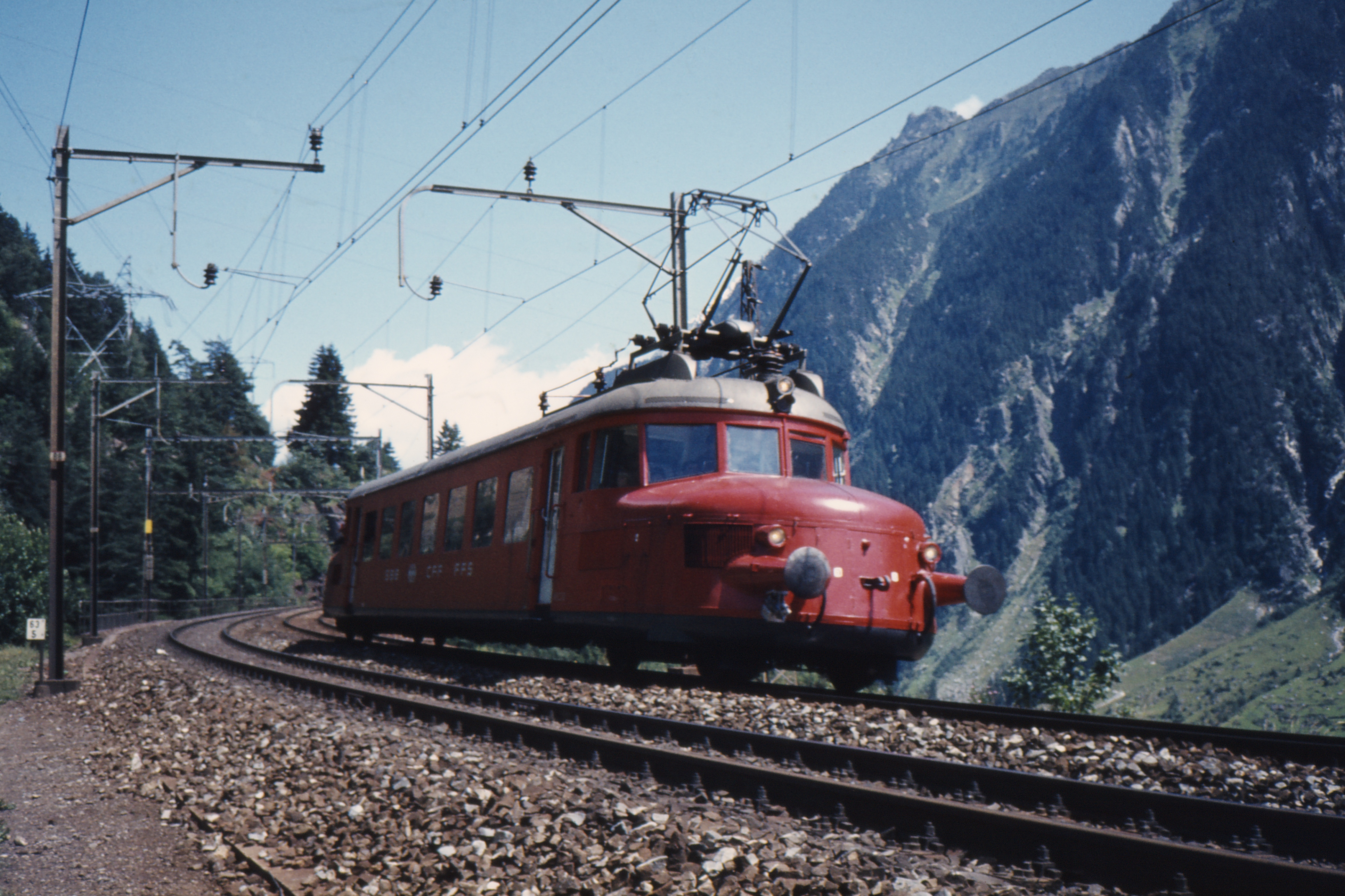 RAe 2/4 Swiss Rail Roter Pfeil by Wassen